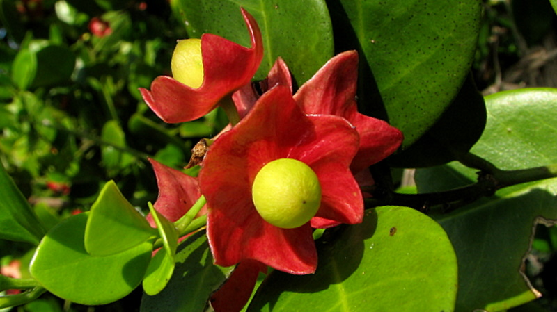 Heisteria perianthomega (Vell.) Sleumer